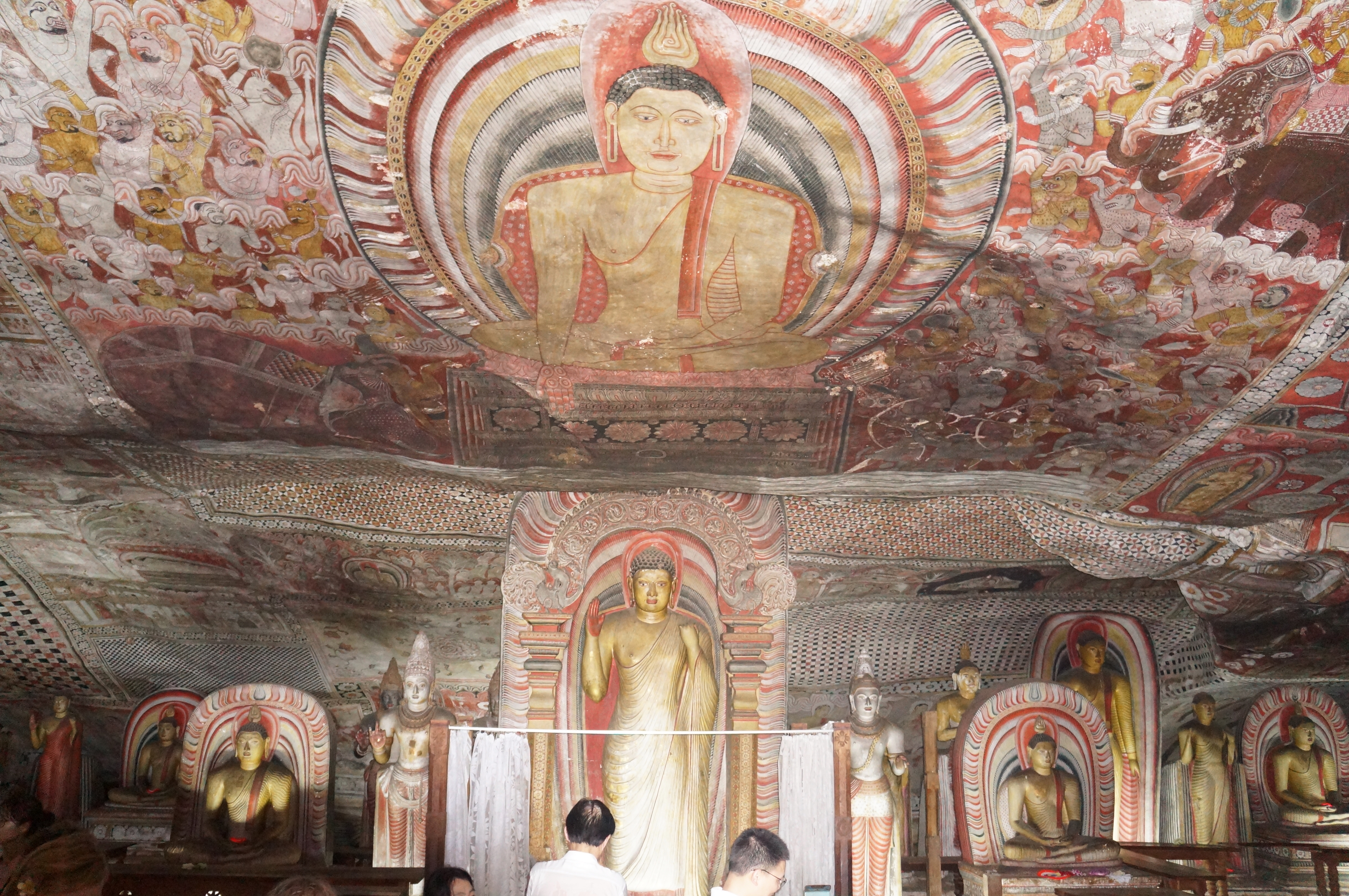 Les différentes peintures et sculptures du Bouddha rencontrées dans les trois cavernes du Temple d'or.- Sri Lanka .- Asie du Sud